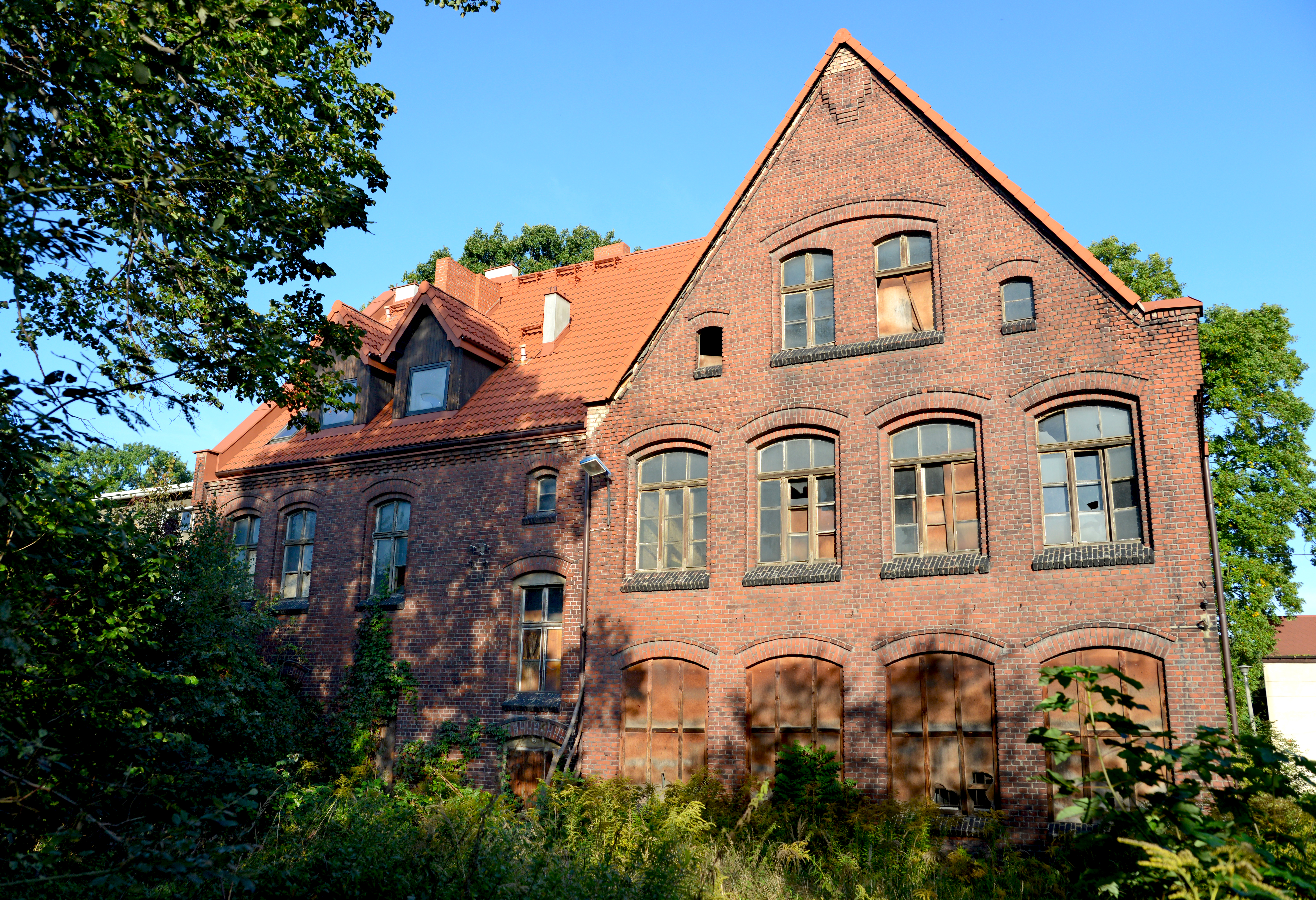 Tarnowskie Góry, szkoła katolicka, 1890